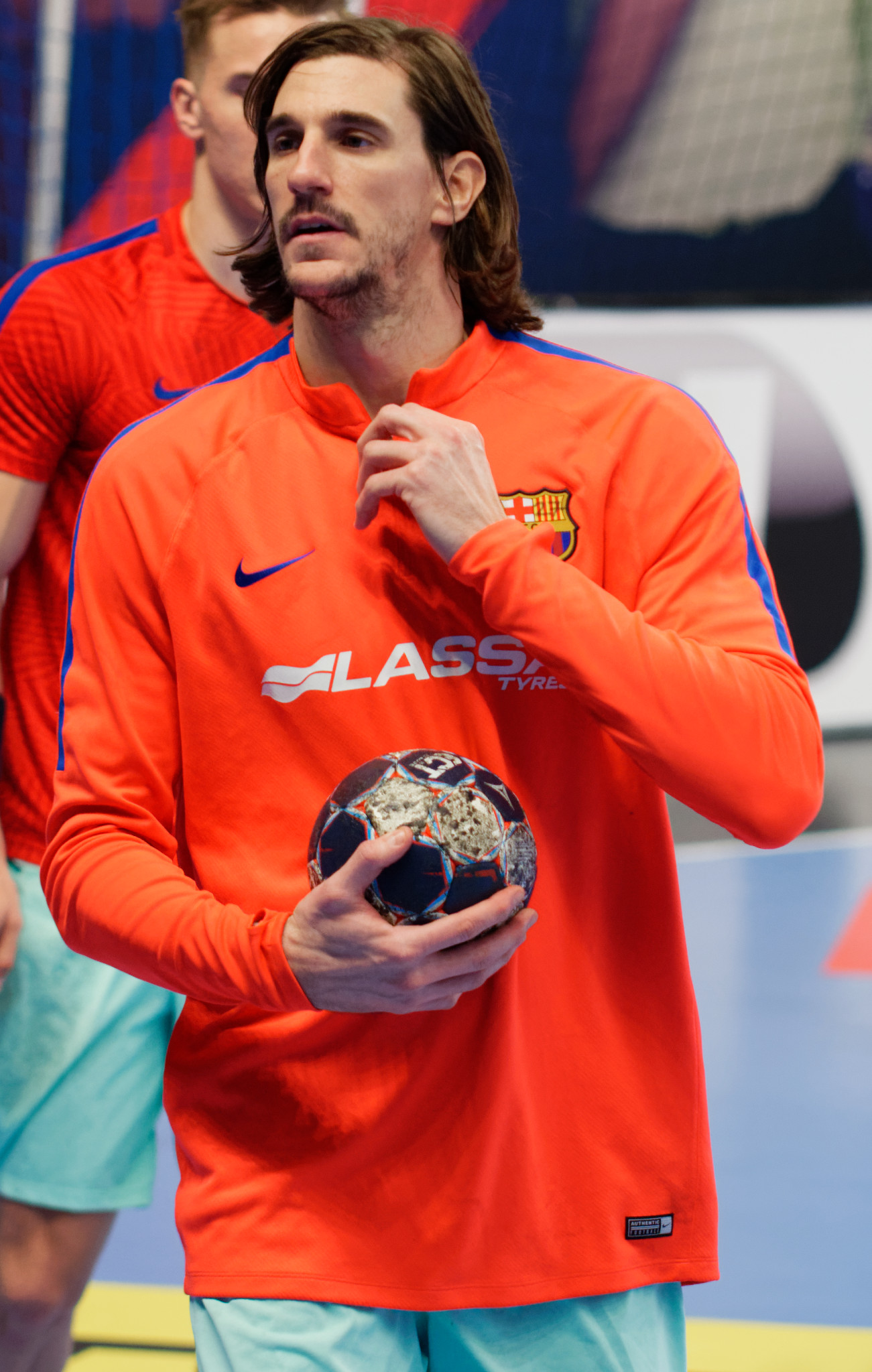 Rencontre de phase de groupe de la ligue des champions 2016-17 entre le PSG et le FC Barcelone. A Coubertin, le 12 novembre 2016.